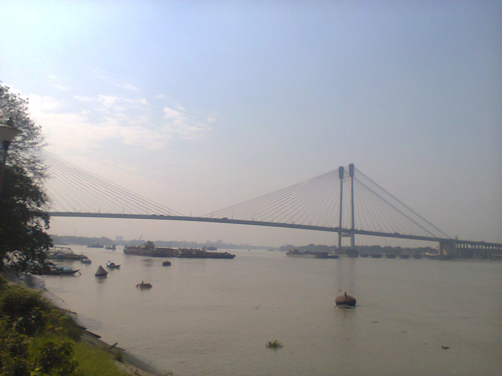 দ্বিতীয় হুগলি সেতু বাবু ঘাট থেকে